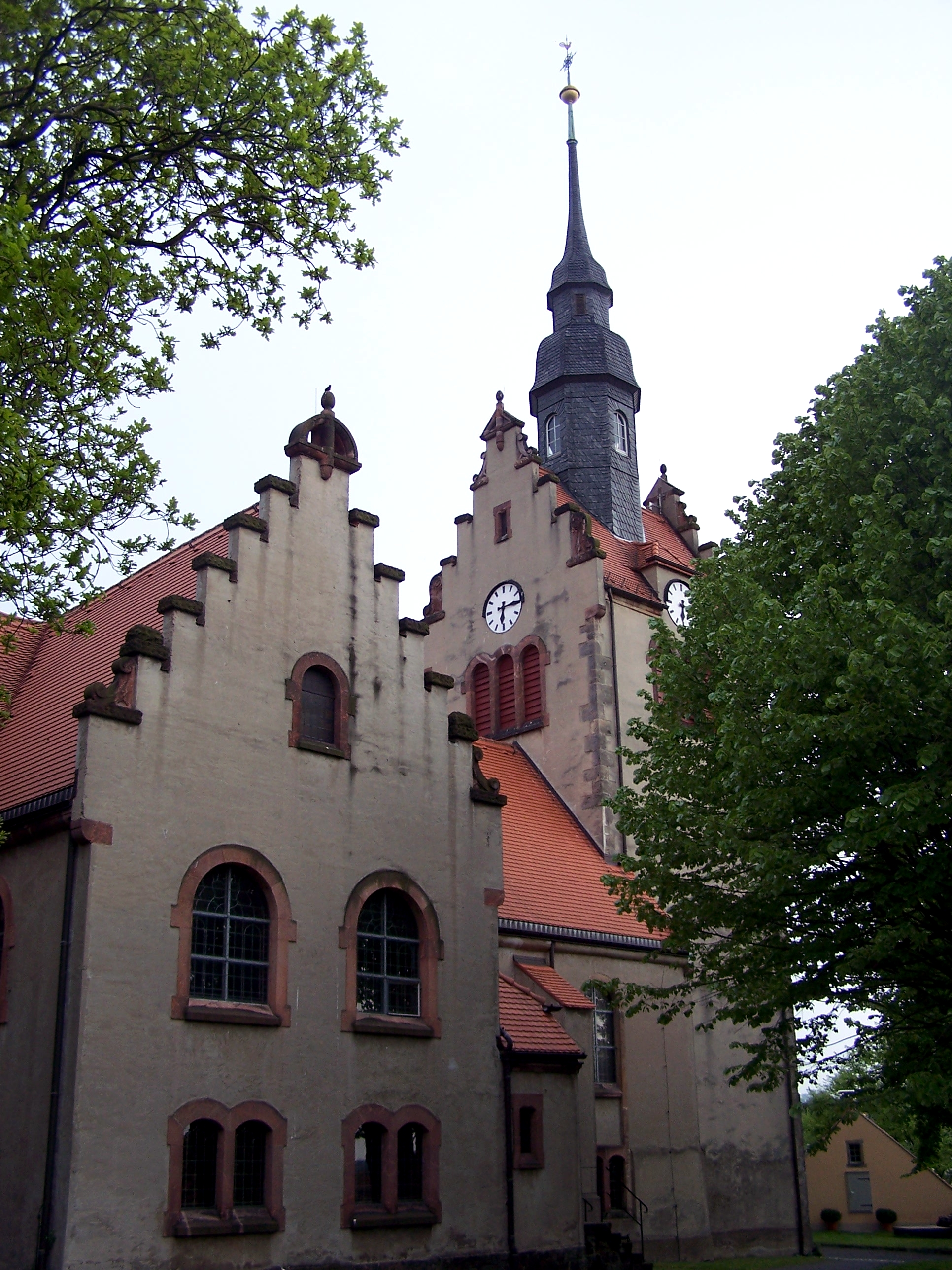 Kirche in Dresden-Weißig